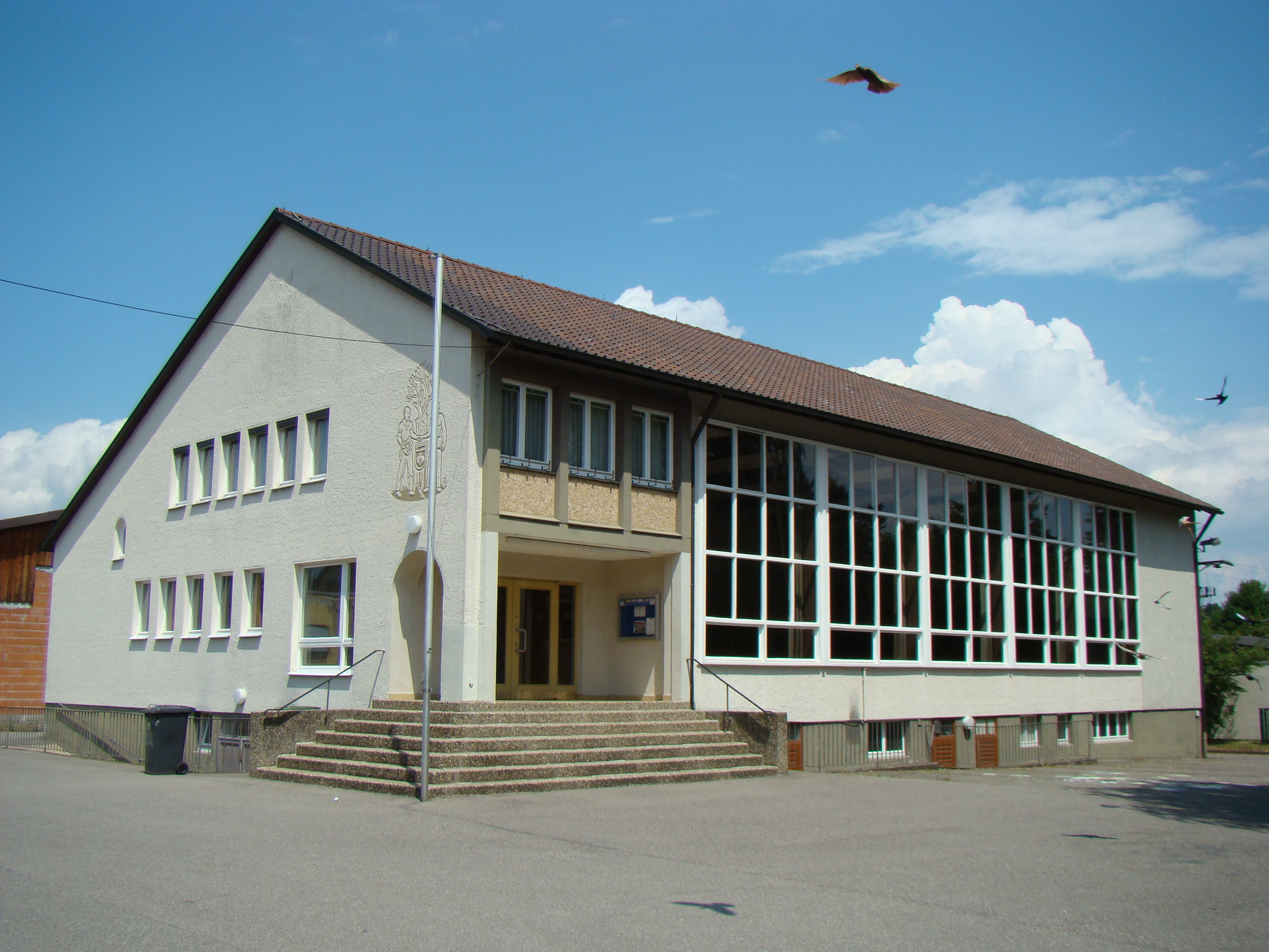 Gemeindehalle in Bretzfeld-Dimbach